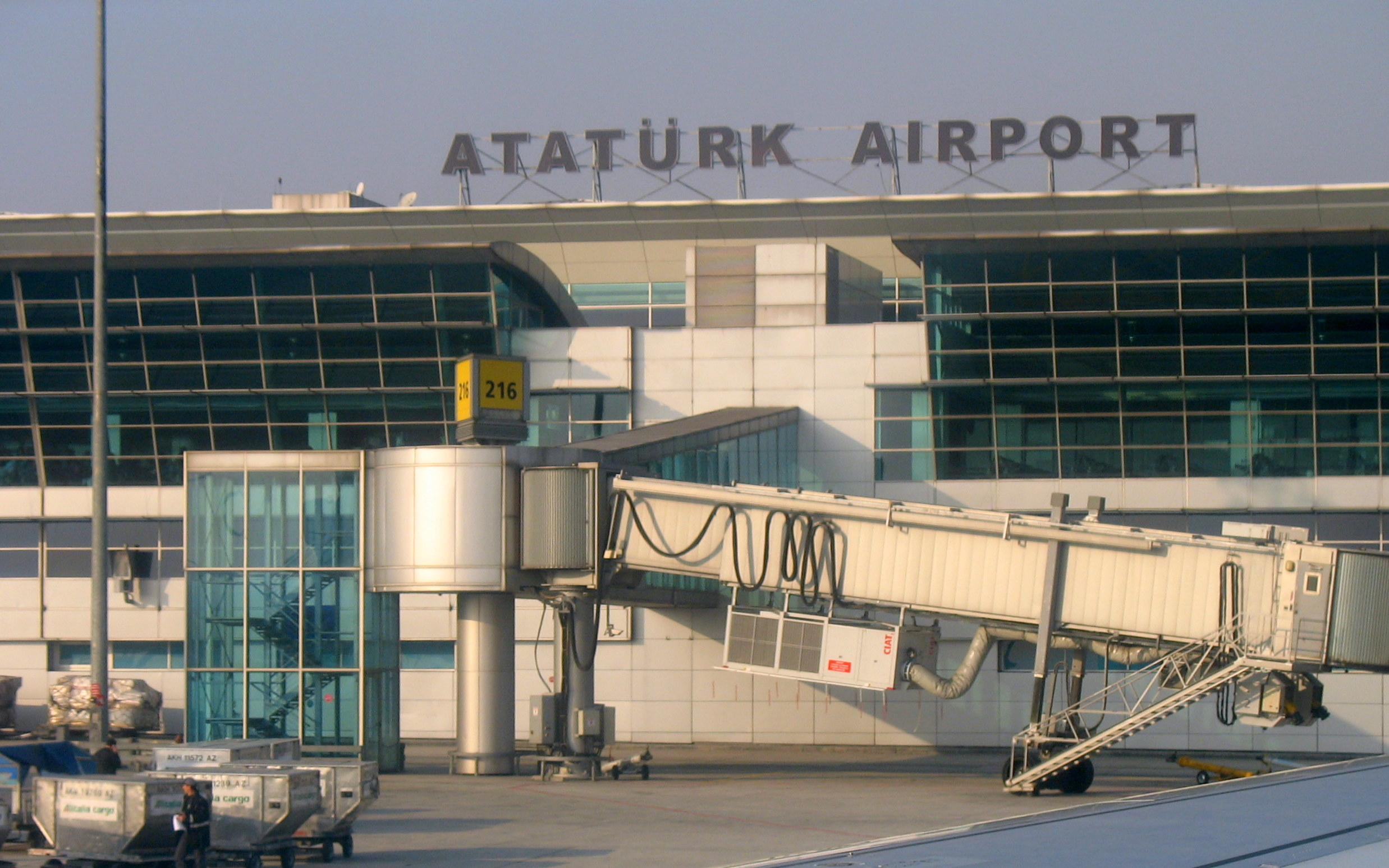 Atatürk Havalimanı onden